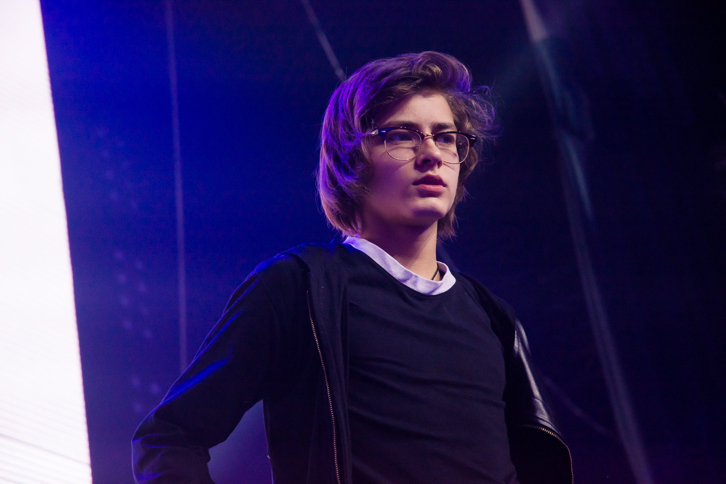 Ильдар Гайнутдинов на концерте «Девичник Teens» (Известия Hall, 03.03.2016)